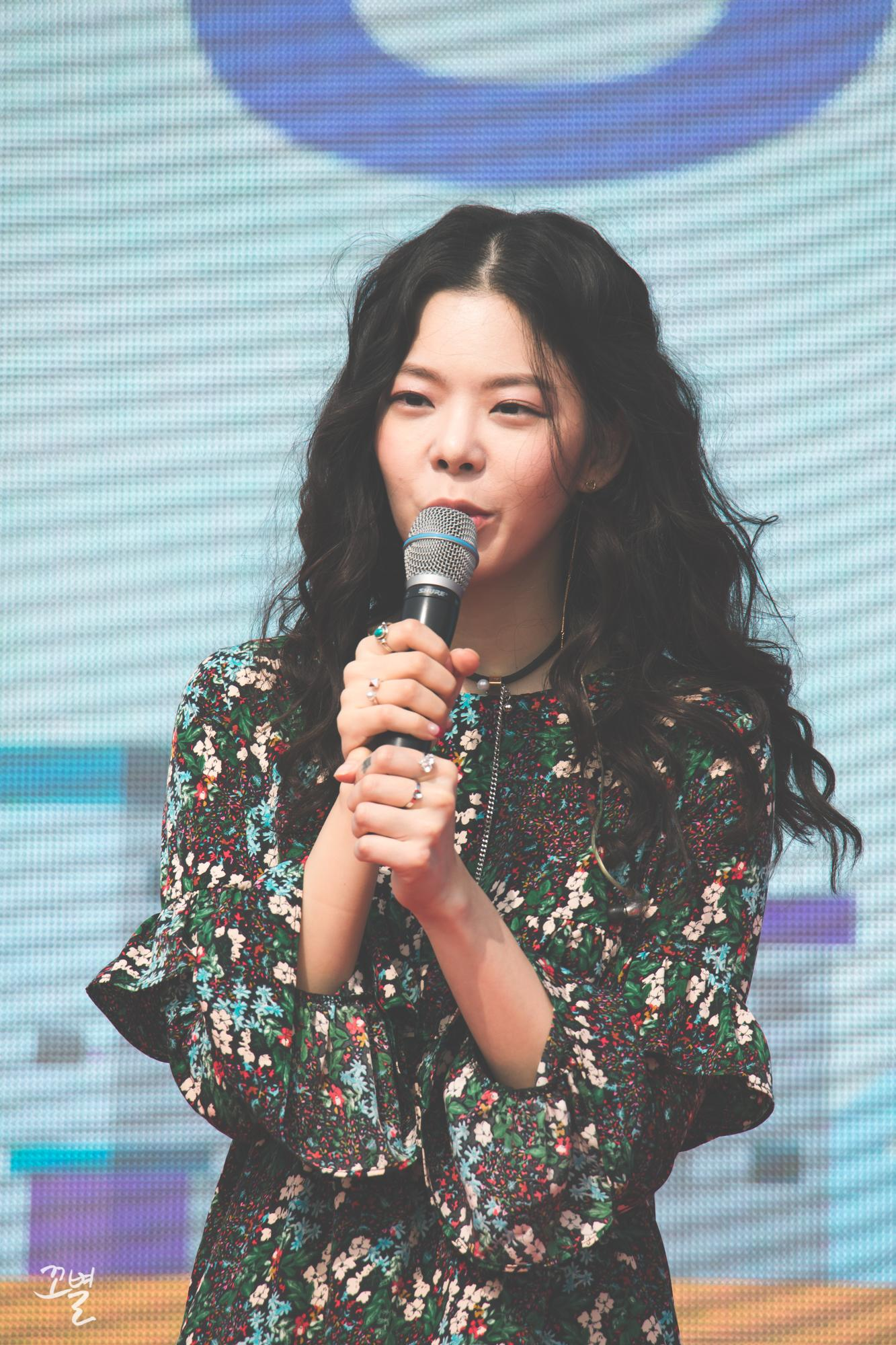 170408 장재인 직찍 @ 수원 장안공원